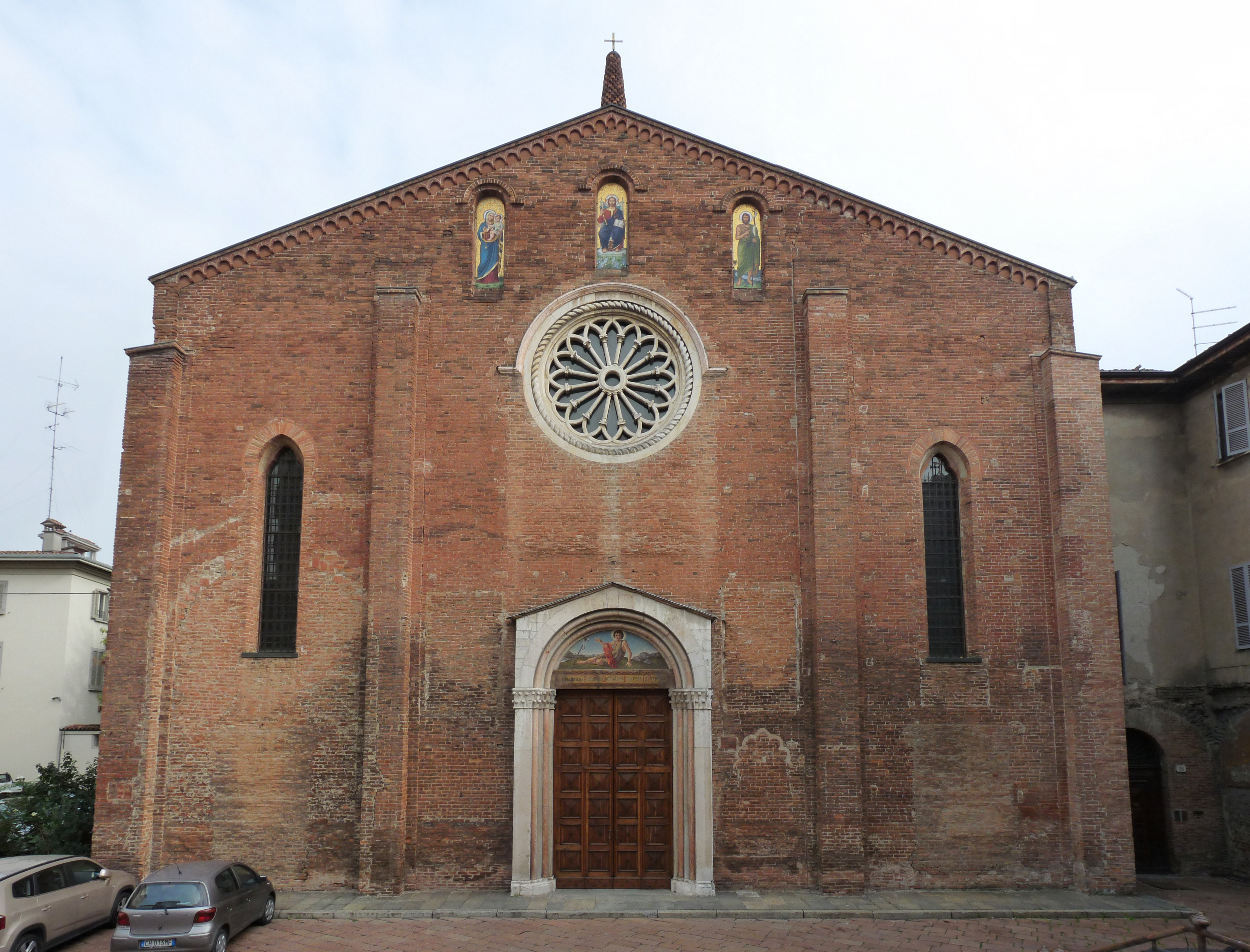 Basilica Chiesa di Sant Giovanni in Canale 1, Piacenza